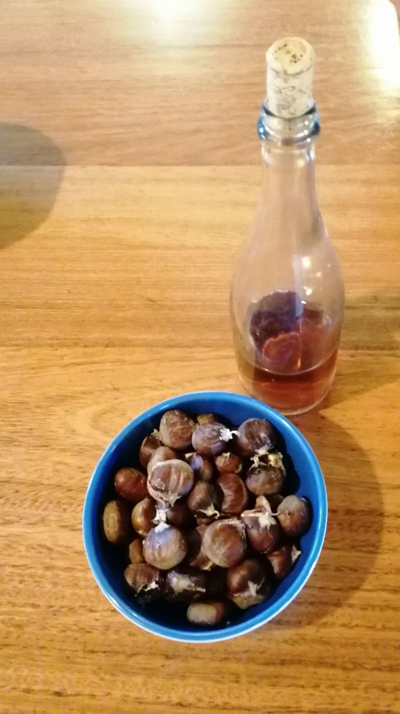 In de herfst als de kastanjes rijp zijn en de druiven geoogst, drinkt men in Portugal traditioneel jeropiga, met kastanjes erbij.